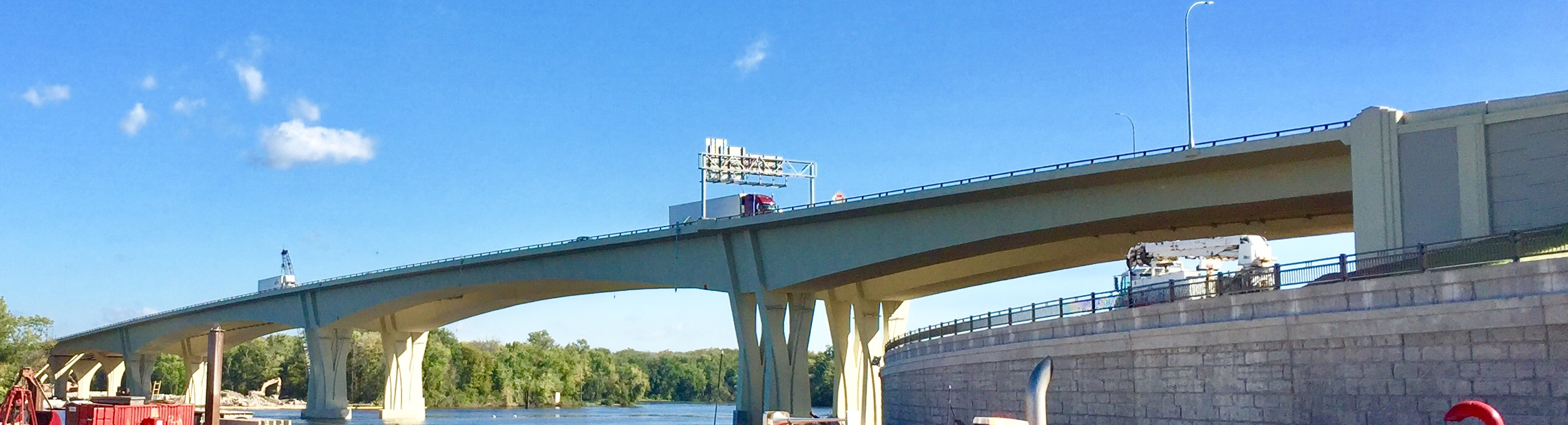 I-90_Mississippi_bridge